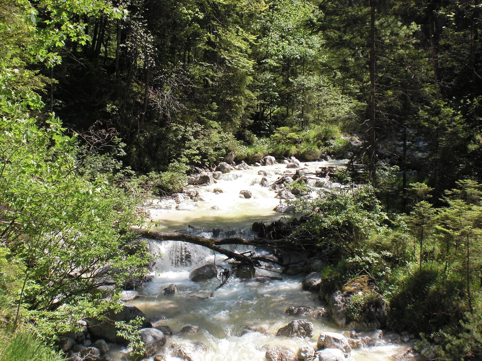 Aschauerklamm nahe Schneizlreuth